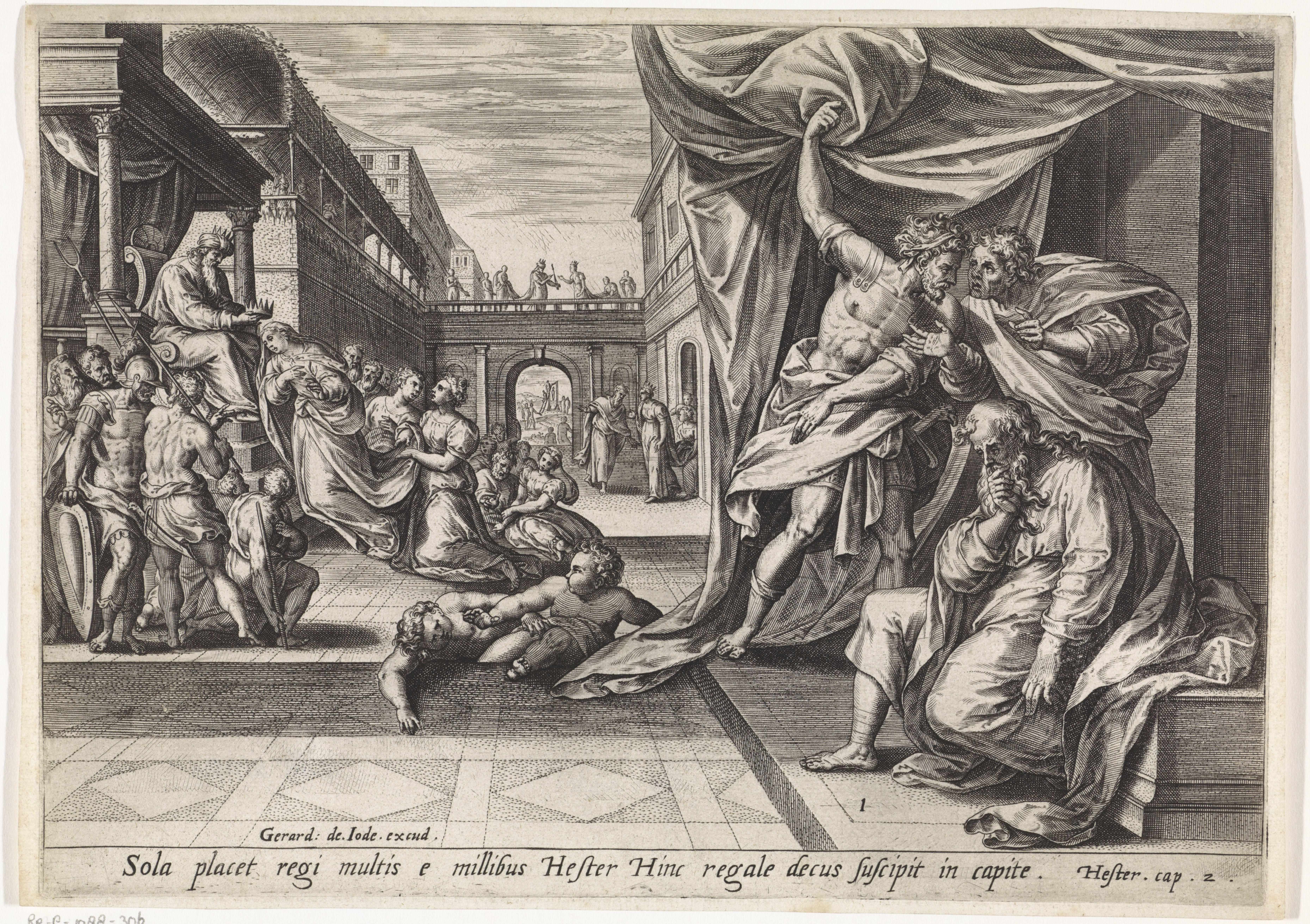 IdentificatieTitel(s): Kroning van EsterGeschiedenis van Ester (serietitel)Thesaurus sacrarum historiarum veteris testamenti (...) (serietitel)Objecttype: prent Serienummer: 1/4Objectnummer: RP-P-1988-306Catalogusreferentie: Mielke 31New Hollstein Dutch 65-1(2)Opschriften / Merken: verzamelaarsmerk, verso, gestempeld: Lugt 2228verzamelaarsmerk, verso, gestempeld: Lugt 2760Omschrijving: Ester wordt links door koning Ahasveros tot koningin gekroond. Op de voorgrond hoort Mordechai Bigtana en Teres samenzweren. Midden rechts is te zien dat Mordechai aan koningin Ester vertelt wat hij heeft gehoord. Op de brug is te zien dat Ester het nieuws namens Mordechai vertelt aan de koning. Onder de brug worden Bigtana en Teres opgehangen. Onder de voorstelling een verwijzing in het Latijn naar de Bijbeltekst in Est. 2.VervaardigingVervaardiger: prentmaker: Hans Collaert (I) (toegeschreven aan)naar ontwerp van: Jan Snellinck (I)uitgever: Gerard de Jode (vermeld op object)Plaats vervaardiging: AntwerpenDatering: 1579 en/of 1585Fysieke kenmerken: gravureMateriaal: papier Techniek: graveren (drukprocedé)Afmetingen: plaatrand: h 204 mm × b 287 mmToelichtingPrent gebruikt in: Thesaurus sacrarum historiaru veteris testamenti, elegatissimis imaginibus expressu excelletissimoru in hac arte viroru opera : nuc primu in luce editus. Antwerpen: Gerard de Jode, 1579. Of prent gebruikt in: Thesaurus sacrarum historiaru[m] veteris (et novi) testame[n]ti, elega[n]tissimis imaginibus expressu[m] excelle[n]tissimoru[m] in hac arte viroru[m] opera : nu[n]c primu[m] in luce[m] editus. Antwerpen: Gerard de Jode, 1585.OnderwerpWat: crowning of EstherVerwerving en rechtenCredit line: Aankoop uit het F.G. Waller-FondsVerwerving: aankoop 24-mar-1988Copyright: Publiek domein